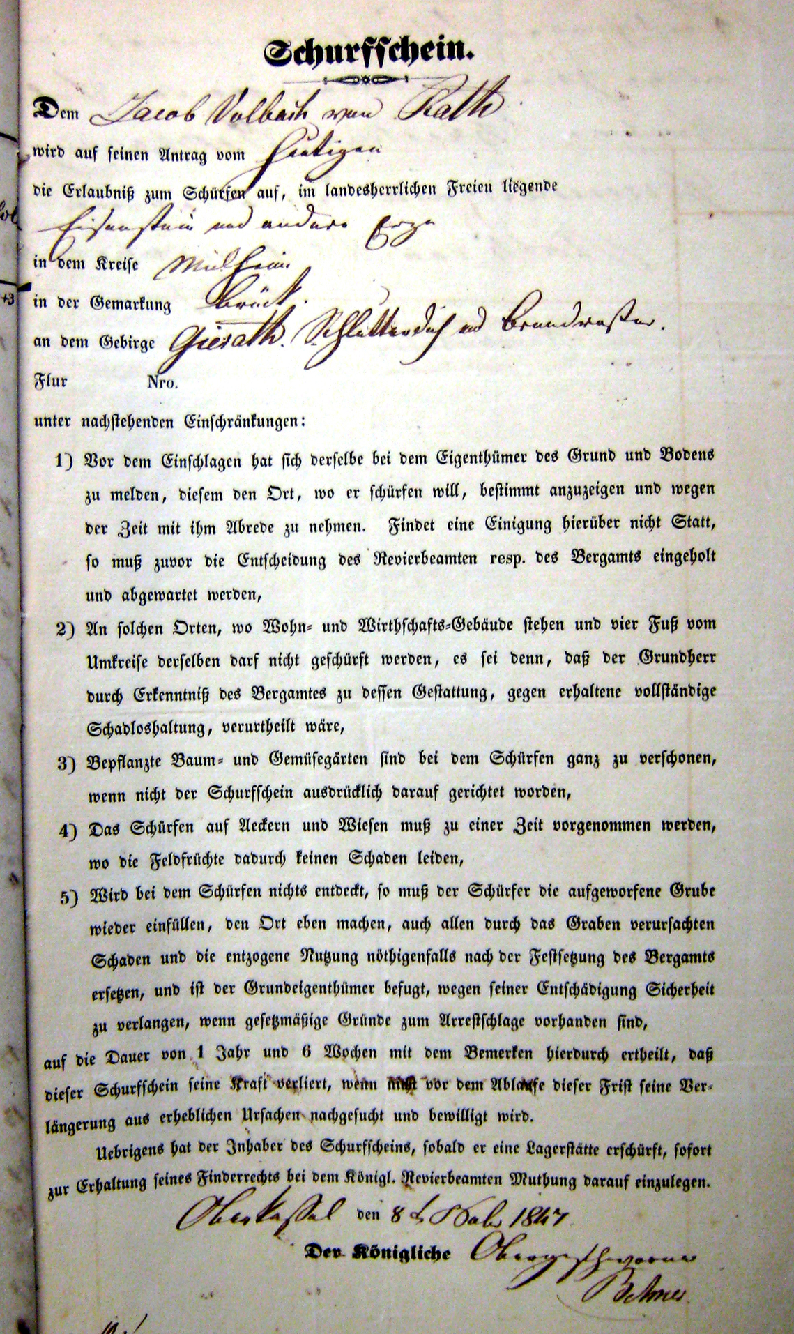 Schurfschein